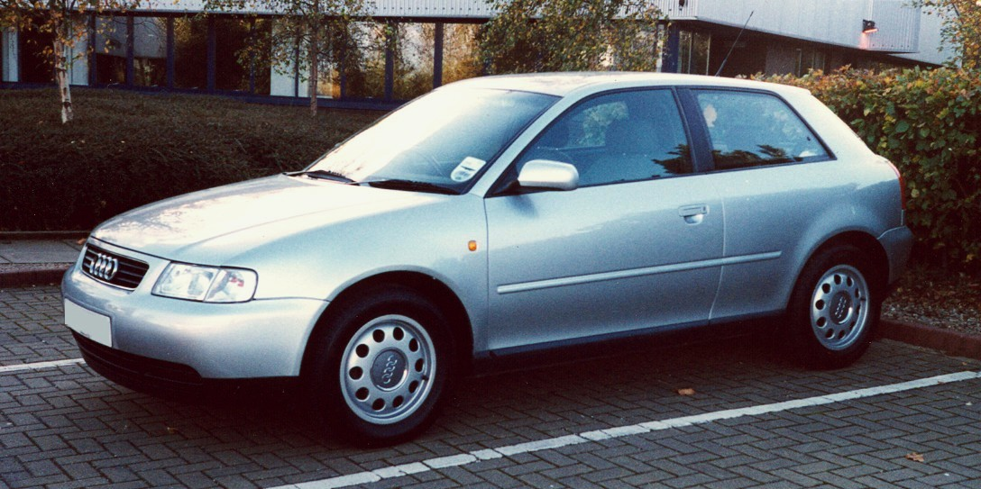 Audi A3 1.6, 3-door, UK-spec 1997 model (Typ 8L), taken in 2001.